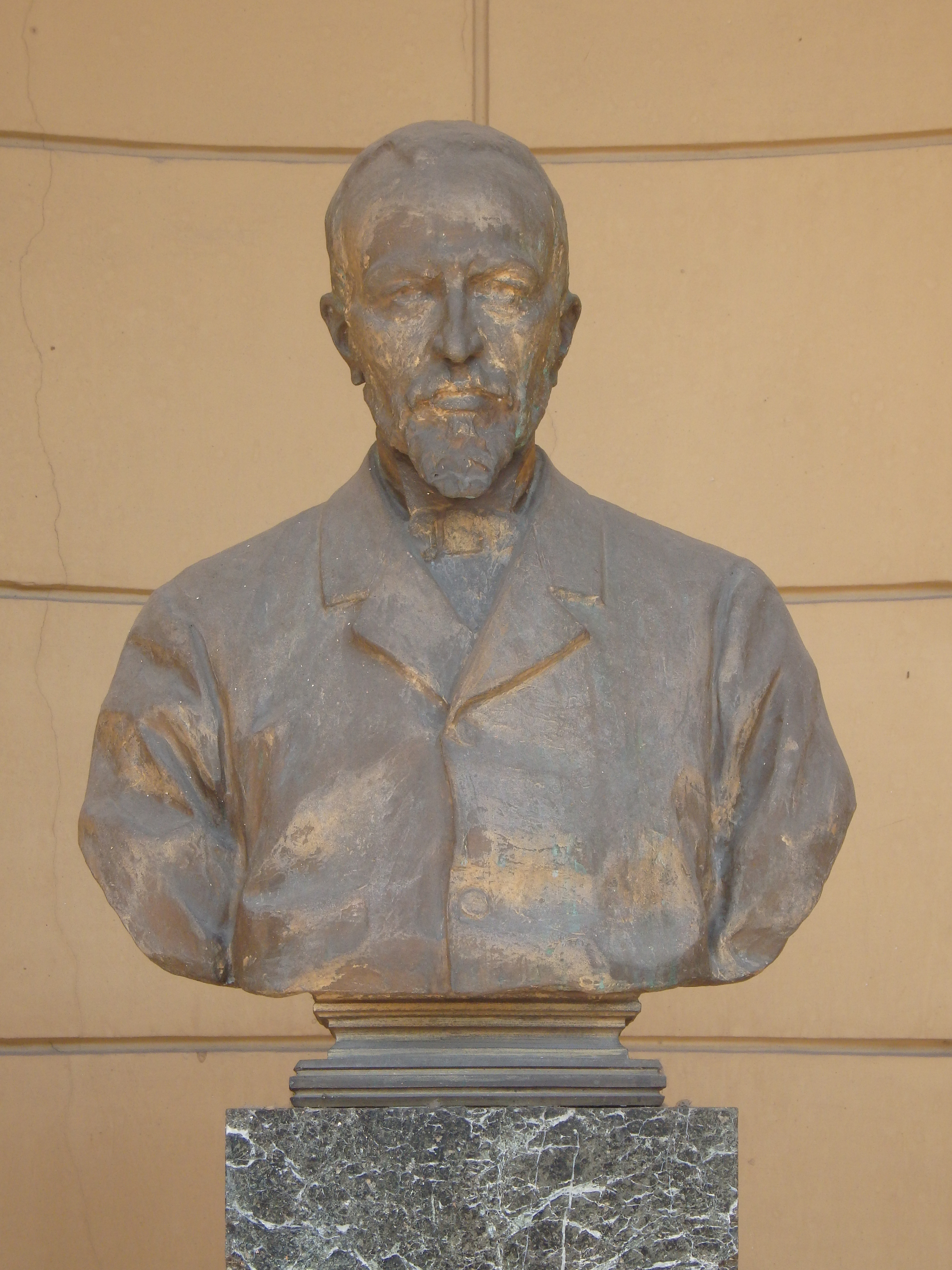 Busto di Gaetano Pini, Milano